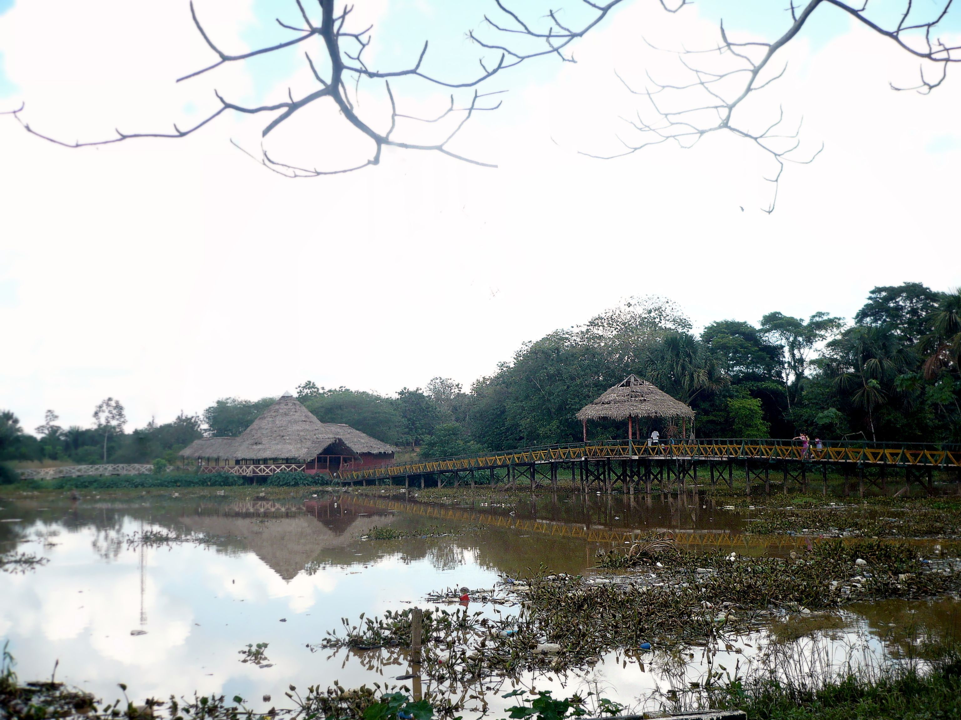 Puente central del Parque Natural de Pucallpa, conectado al río medio entre el zoológico, el museo y su área campestre.